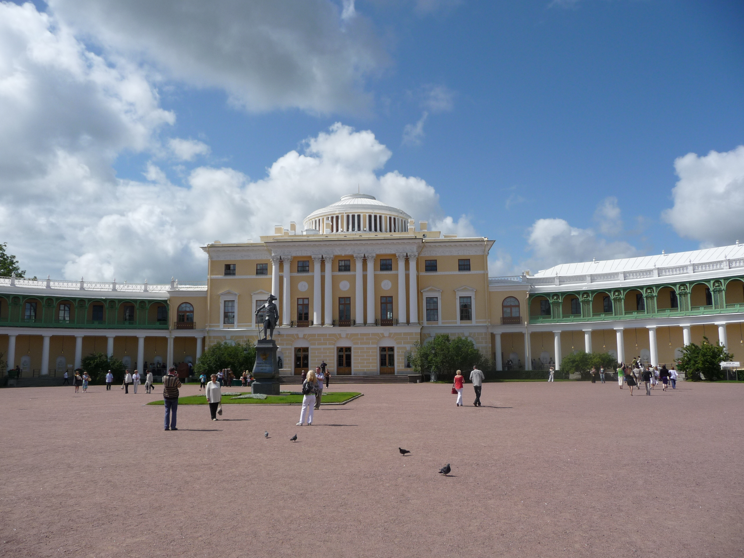 Palace-Pablovsk-p1030748.jpg